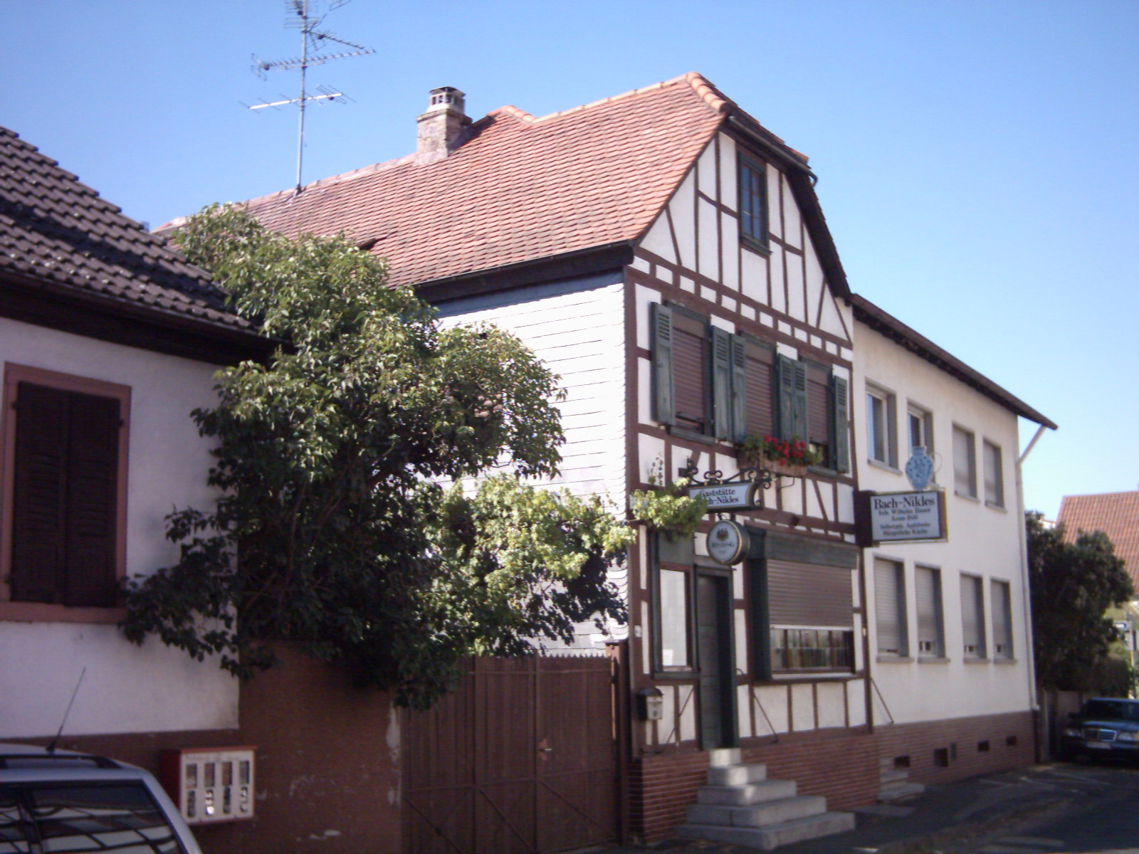 Äppelwoikneipe "Bach-Nikles" in der Oberhofstraße in Bieber